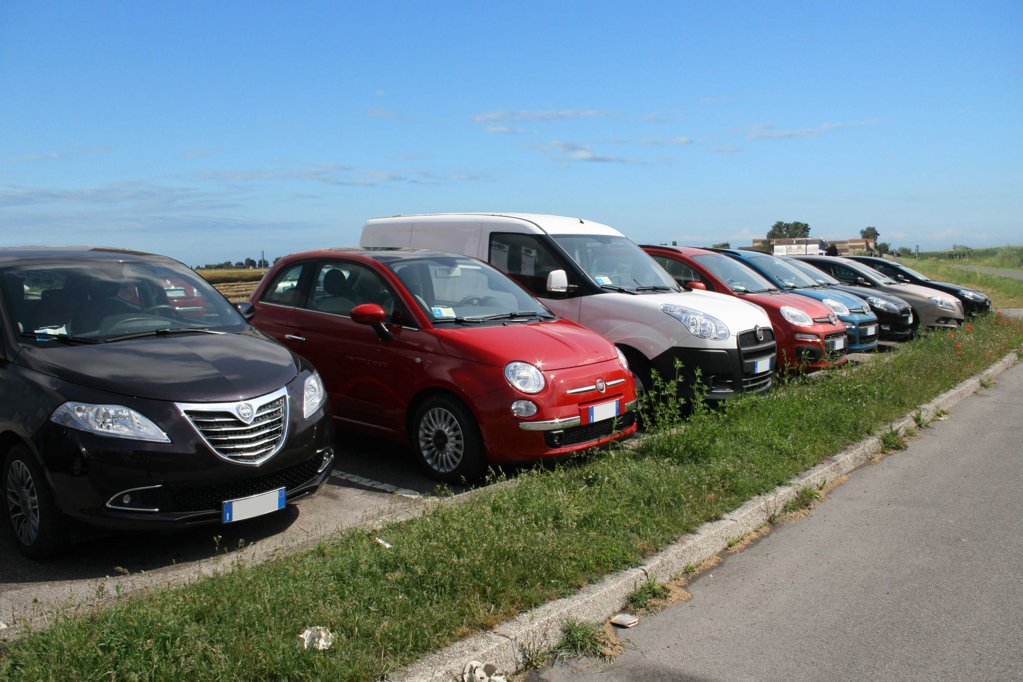 Una carrellata di vetture del gruppo fiat, da sinistra: Lancia Ypsilon (2011), Fiat 500 (2007), Fiat Doblò (2009), Fiat Panda (2011), Fiat Panda (2011), Fiat Bravo (2007), Lancia Delta (2008), Fiat Bravo (2007). Fotografate in una campagna nei pressi di Milano